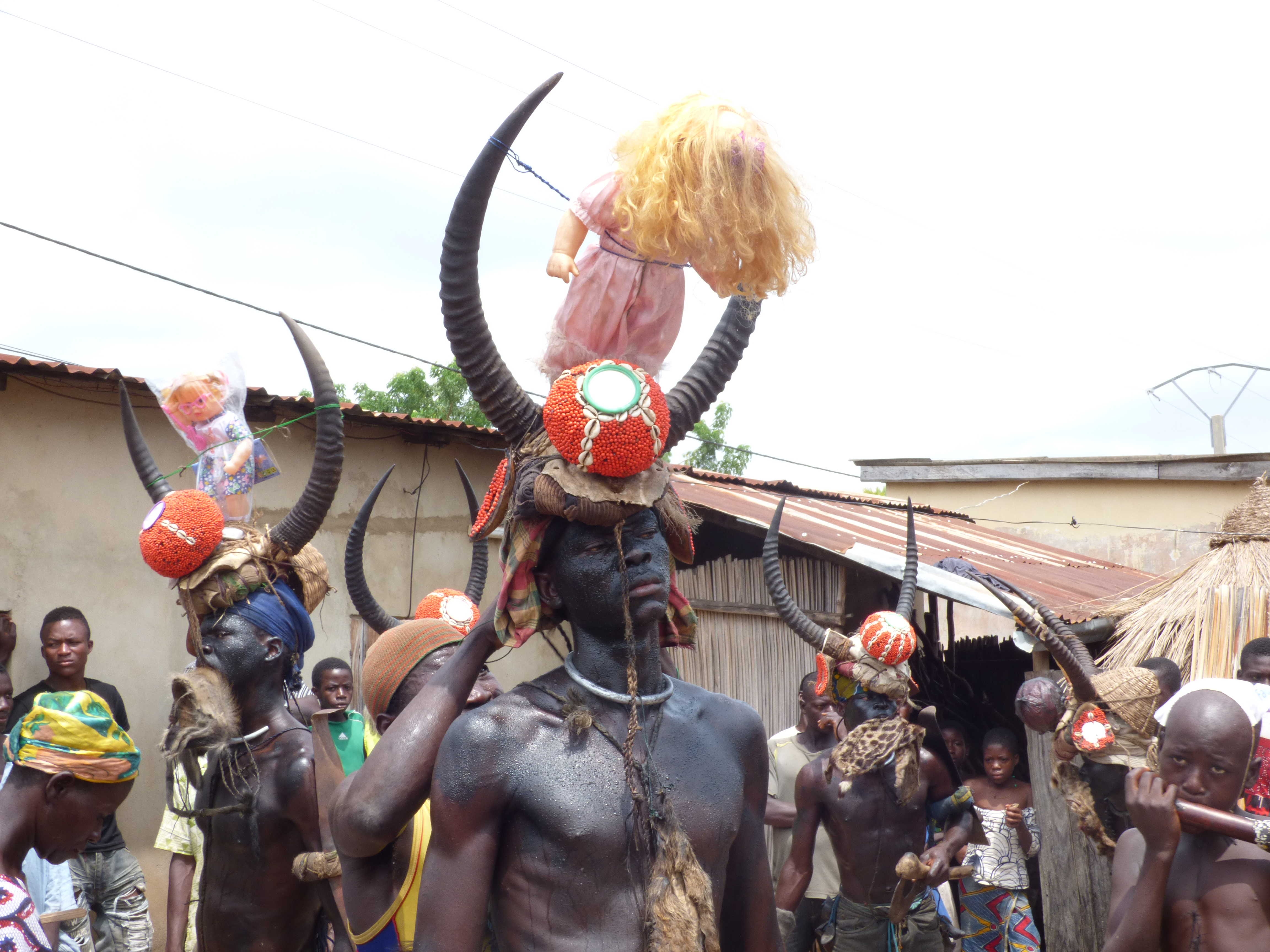 Un des Kondona Kabre de passage à Siou. This is an image of Cultural Fashion or Adornment from Togo